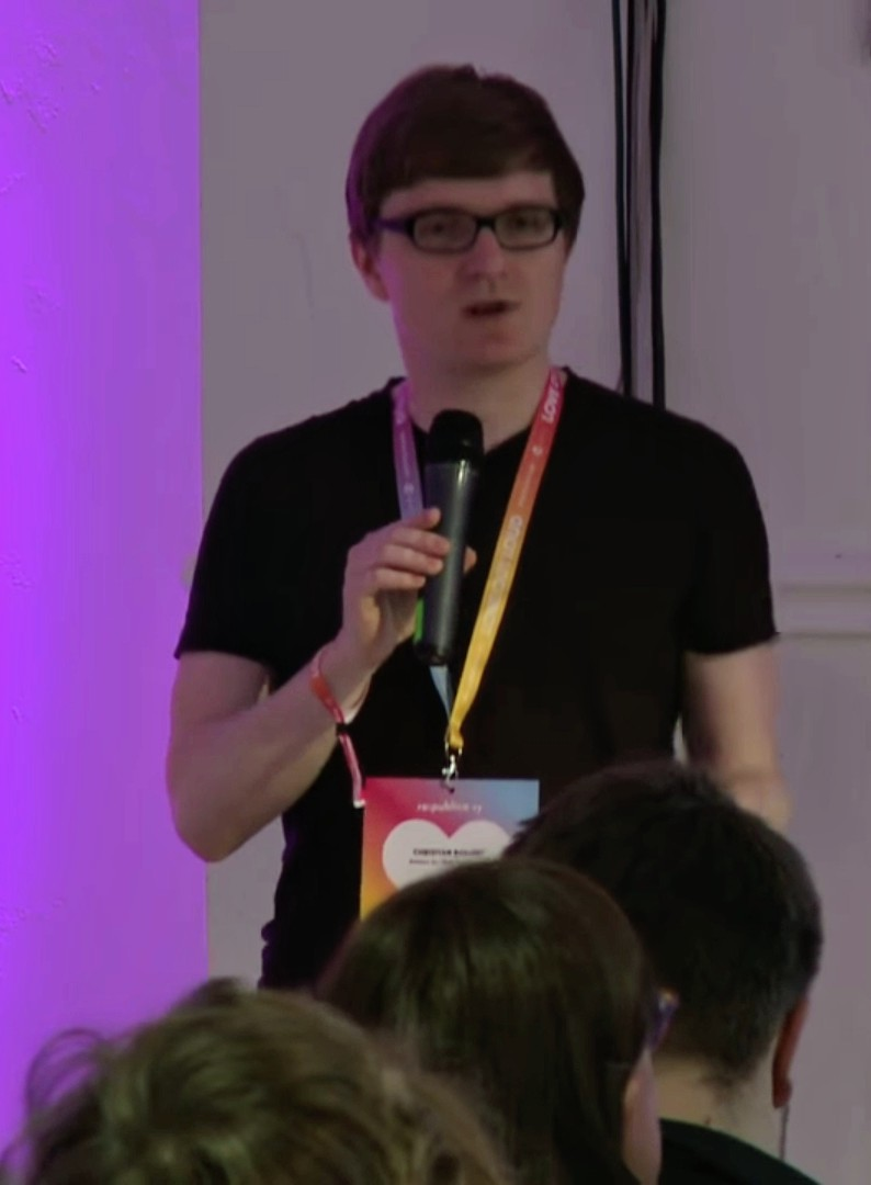 Find out more at: Podcasts und Audio im Netz könnten noch viel erfolgreicher sein: für NutzerInnen UND MacherInnen. In verschiedenen Bereichen fehlt Bewegung. Wie noch mehr Bewegung in dieses spannende Umfeld kommen kann, wird hier vorgestellt und diskutiert. Christian Bollert Creative Commons Attribution-ShareAlike 3.0 Germany (CC BY-SA 3.0 DE)